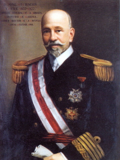 Retrato del marino español José María Chacón y Pery (1852-1922), que llegó a ser ministro de Marina en 1918, durante el reinado de Alfonso XIII y jefe del Estado Mayor Central. Y fue ascendido a capitán general de la Armada en 1920, dos años antes de su muerte.